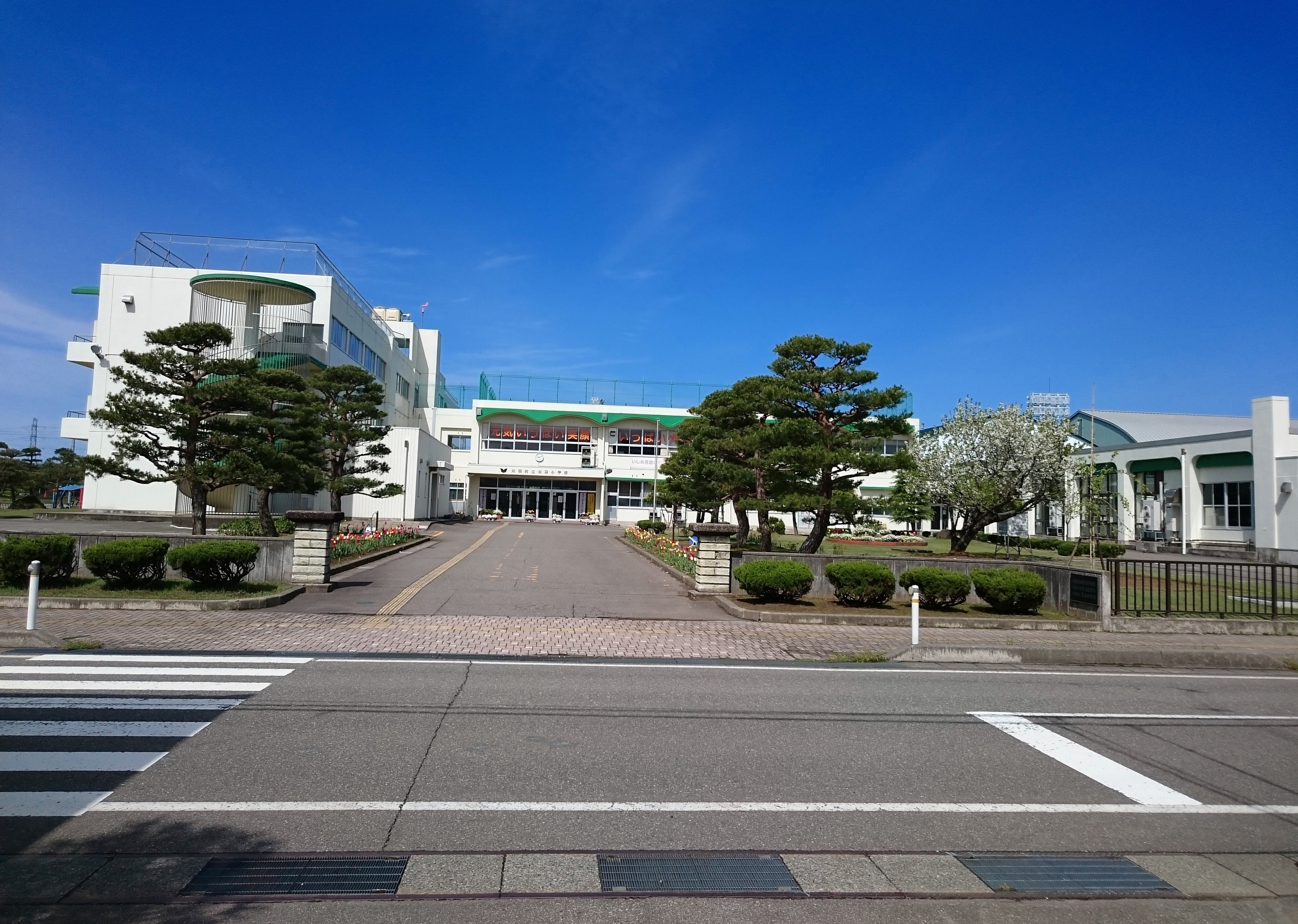 刈羽村立刈羽小学校の校舎全景